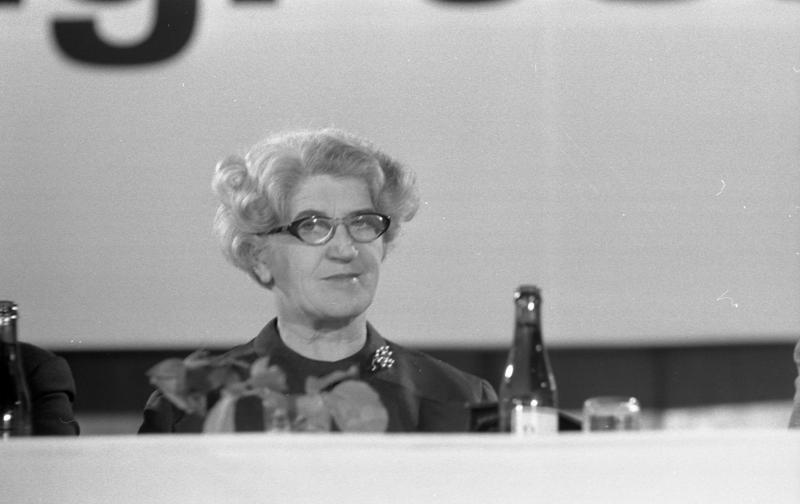 Bundeskanzler Kiesinger spricht vor dem CDU Wahlkongress in Essen im städtischen Saalbau